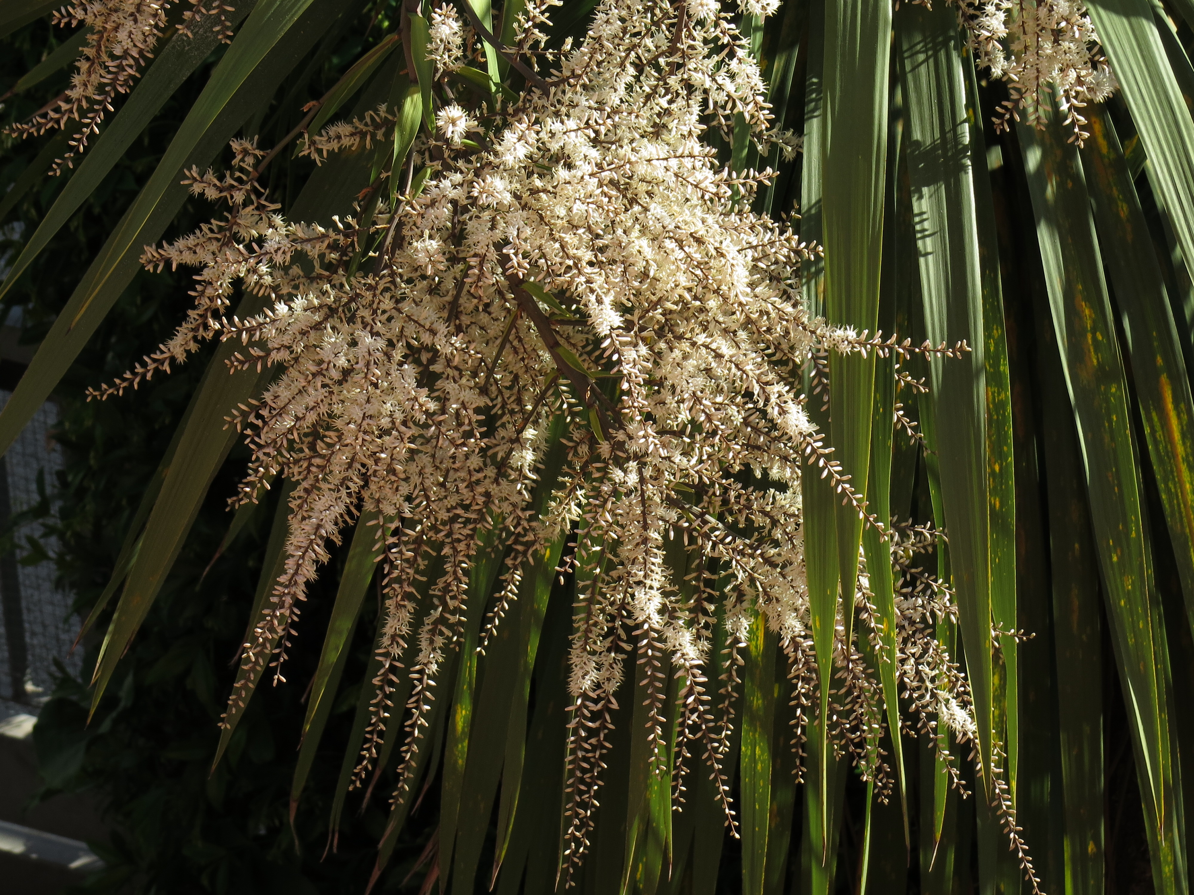 I fiori del cordyline australis su una pianta coltivata a Roma